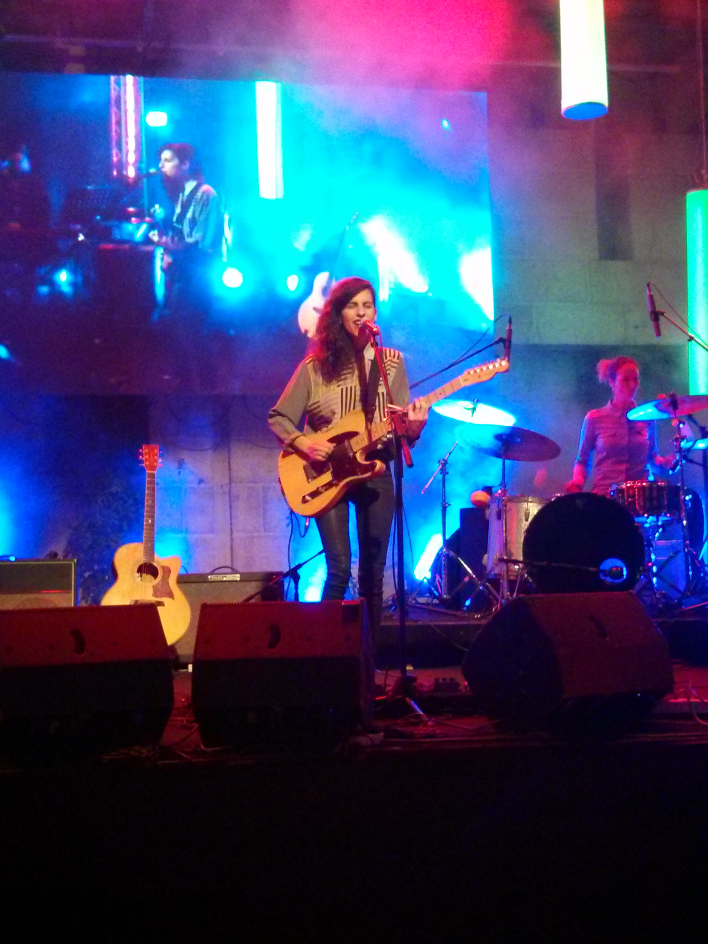 Tamar Eisanman, live show in Jerusalem, 2014